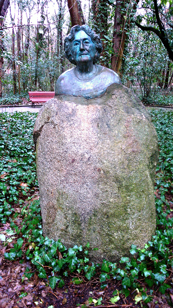 Busto en bronce de la escritora vallisoletana Rosa Chacel, realizado en 1988 por el escultor madrileño Francisco Barón. Está situado en el Campo Grande, parque de la Ciudad de Valladolid (España).